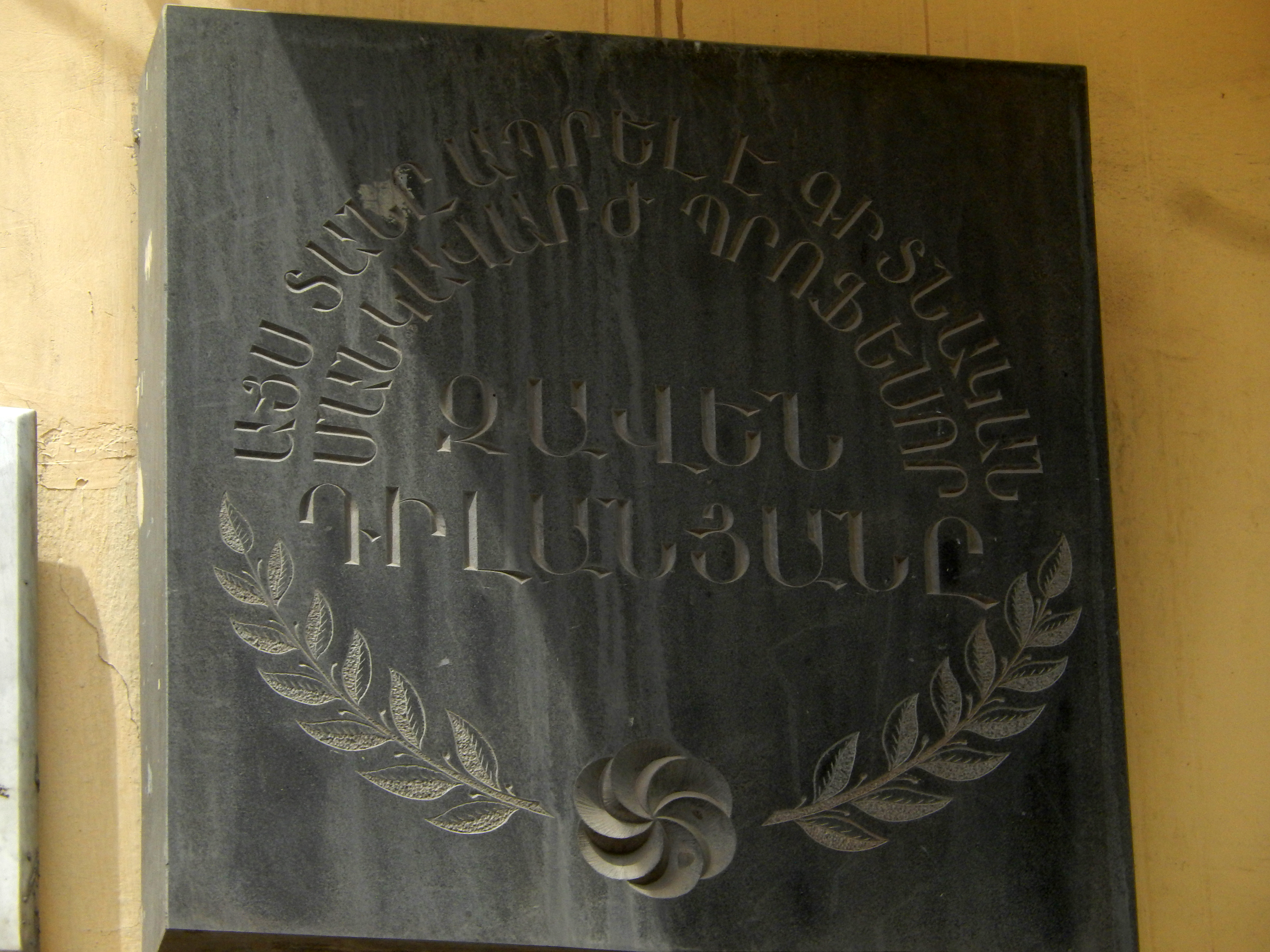 Zaven Dilanyan's plaque